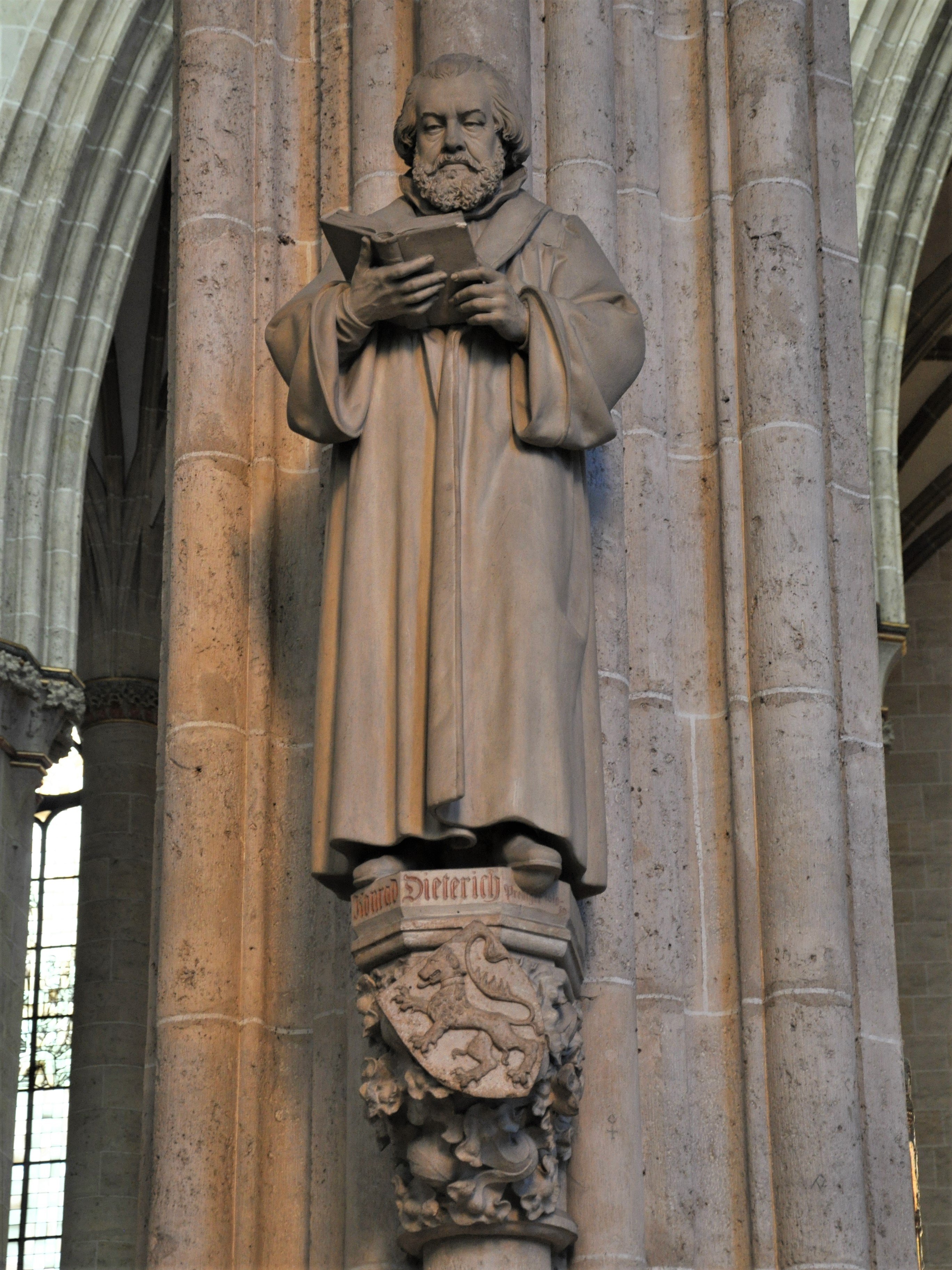 Ulm, Ulmer Münster, Pfeilerstatuen in den Seitenschiffen mit Gestalten der Stadtgeschichte und Kirchengeschichte; Bildhauer: Karl Federlin (1854–1939); Statue: Münsterprediger Konrad Dieterich (1575–1639)